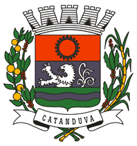 Brasão do município de Catanduva, estado de São Paulo, instituído pela Lei nº 1133/1970